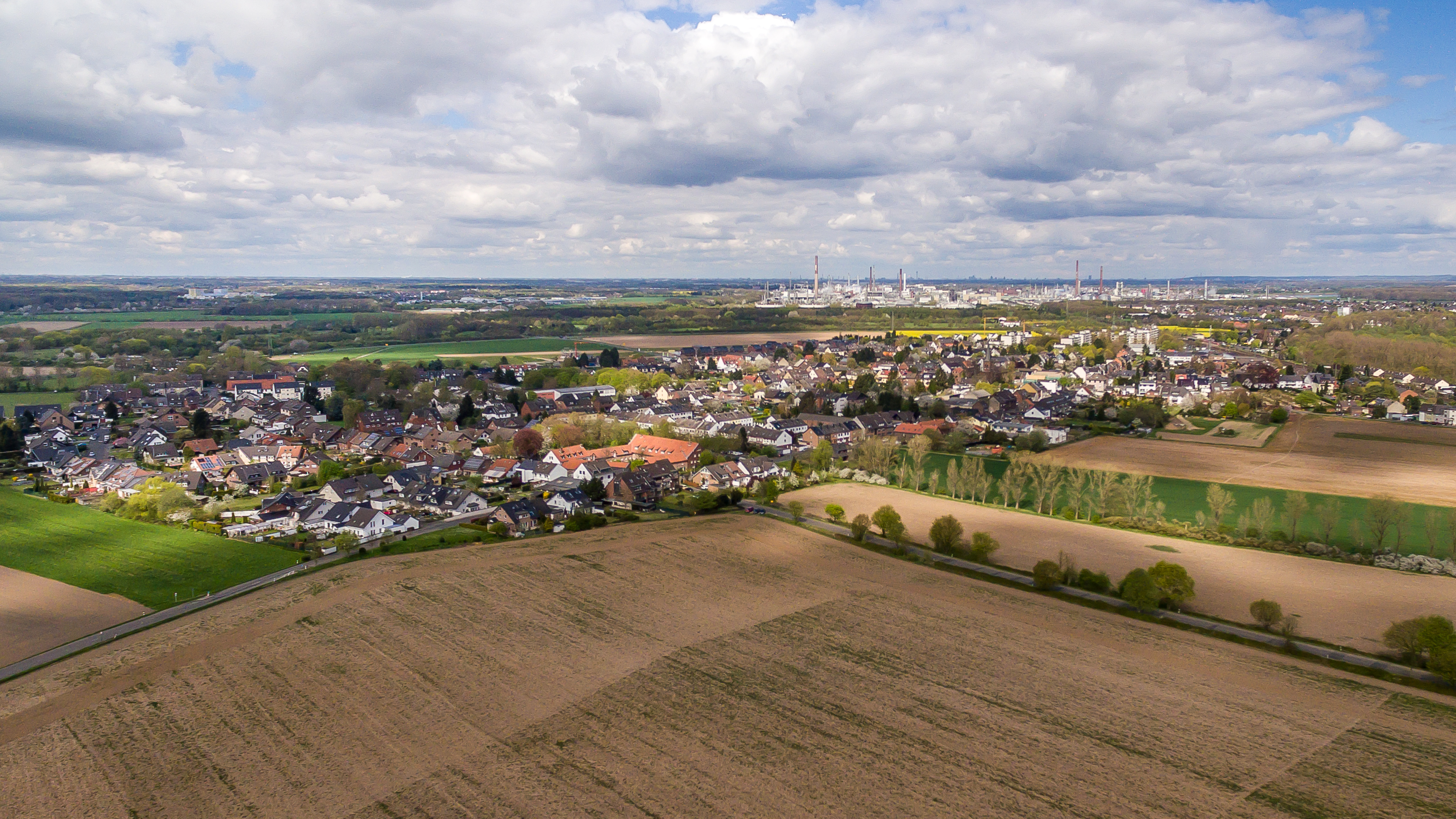 Luftaufnahme Köln-Roggendorf/Thenhoven. Im Hintergrund der Chempark Dormagen